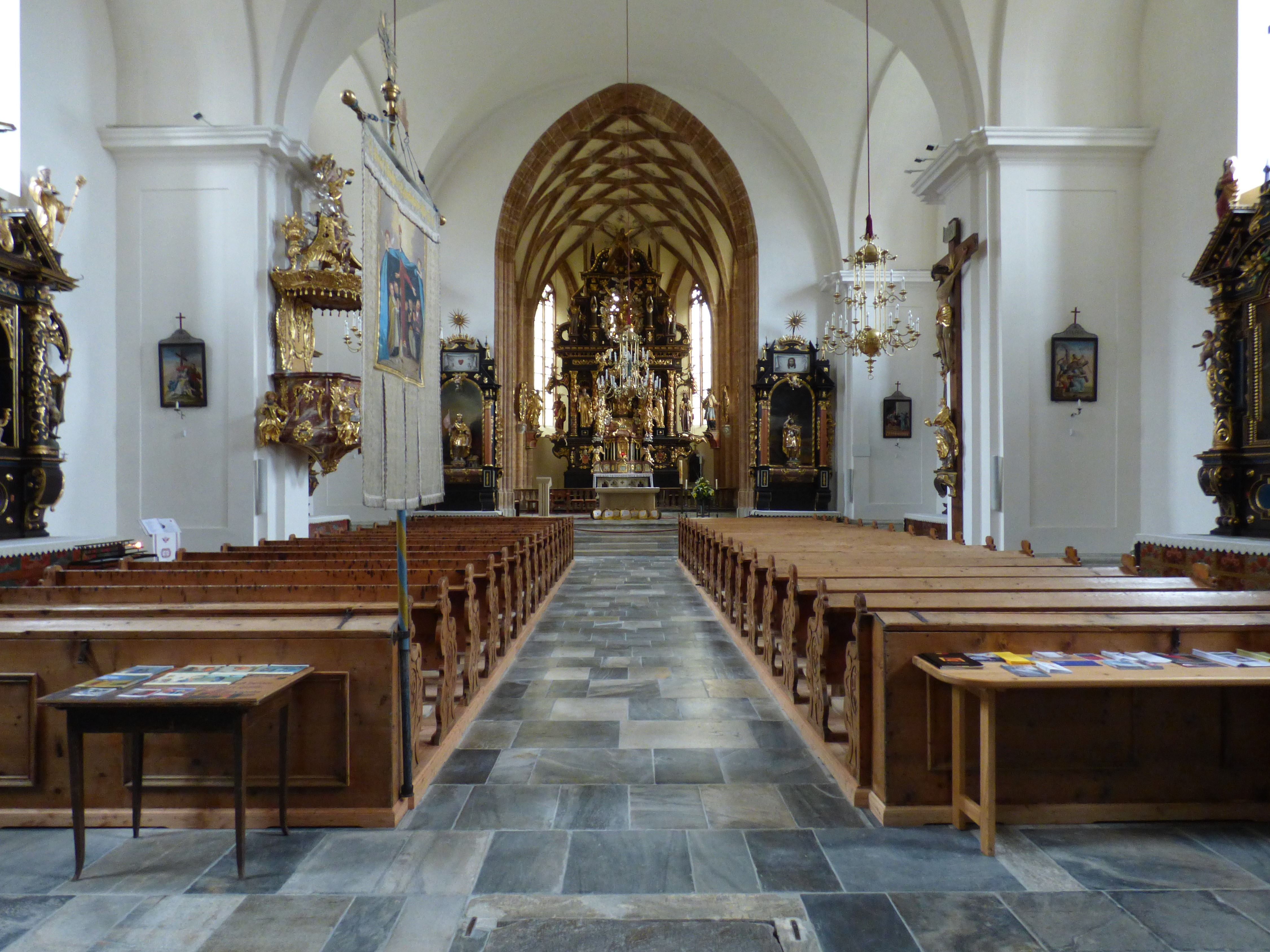 Pfarrkirche Maria Himmelfahrt, Mariahof (Steiermark), Innenansicht